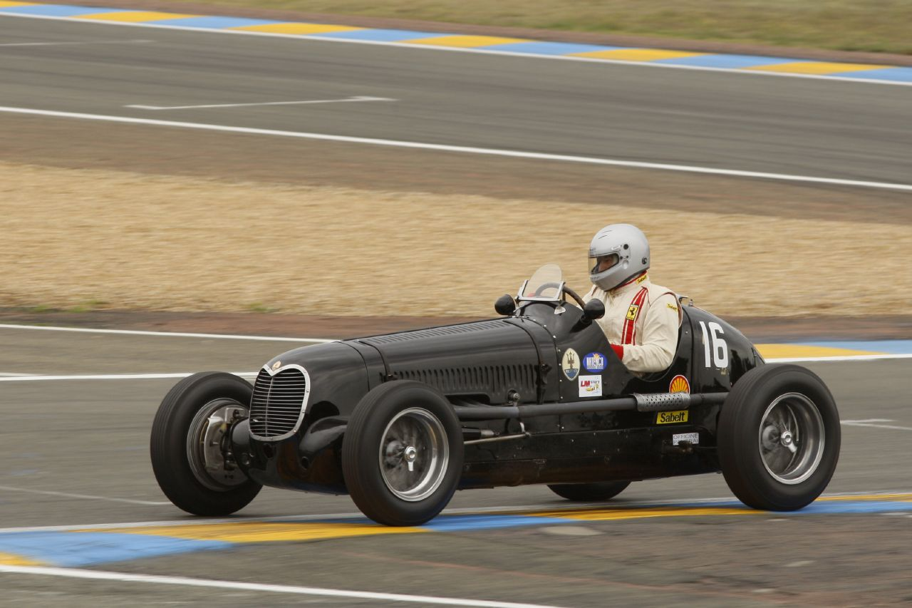 Maserati 6CM de Willi BALZ